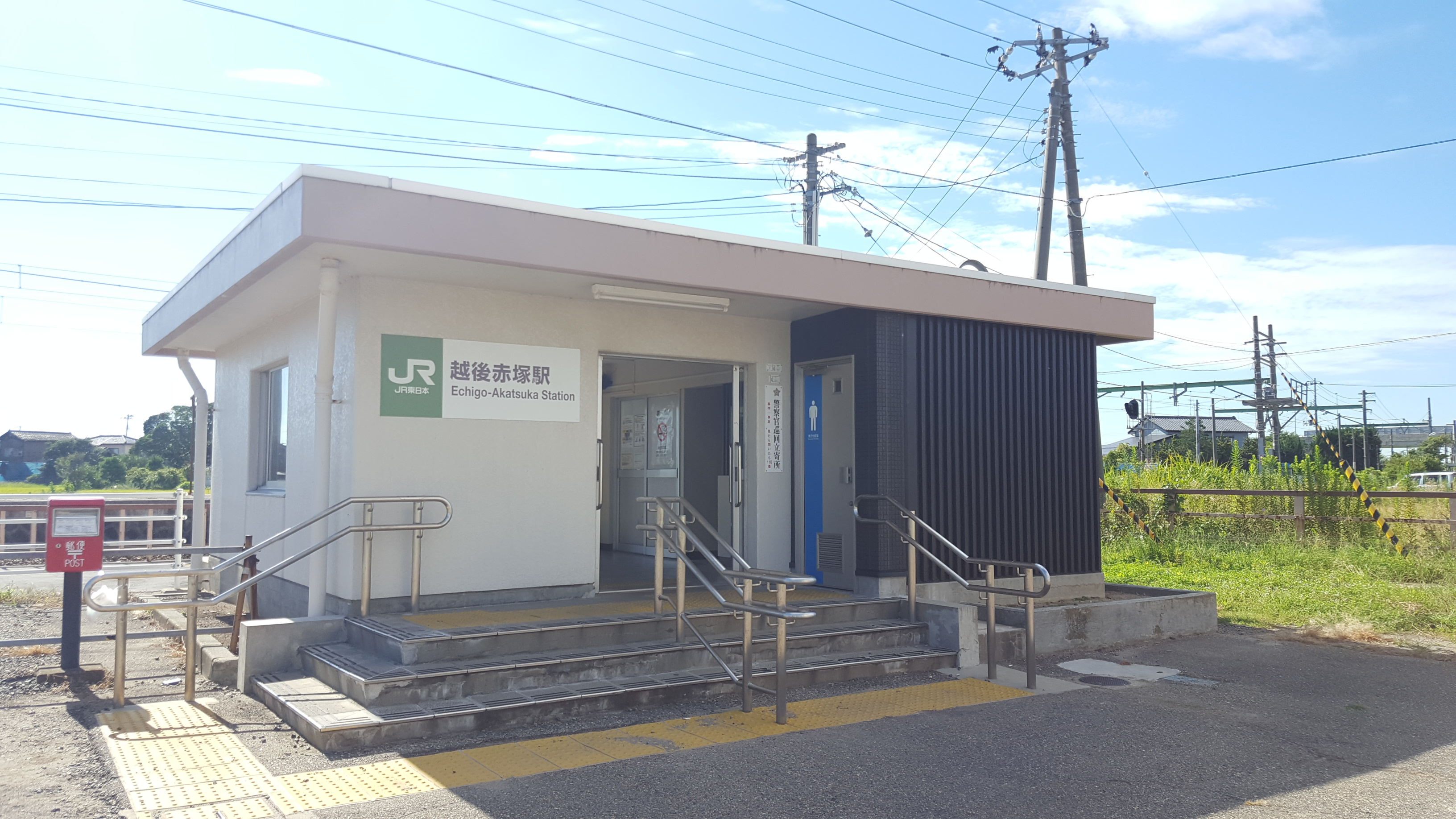 越後赤塚駅の画像を更新します。